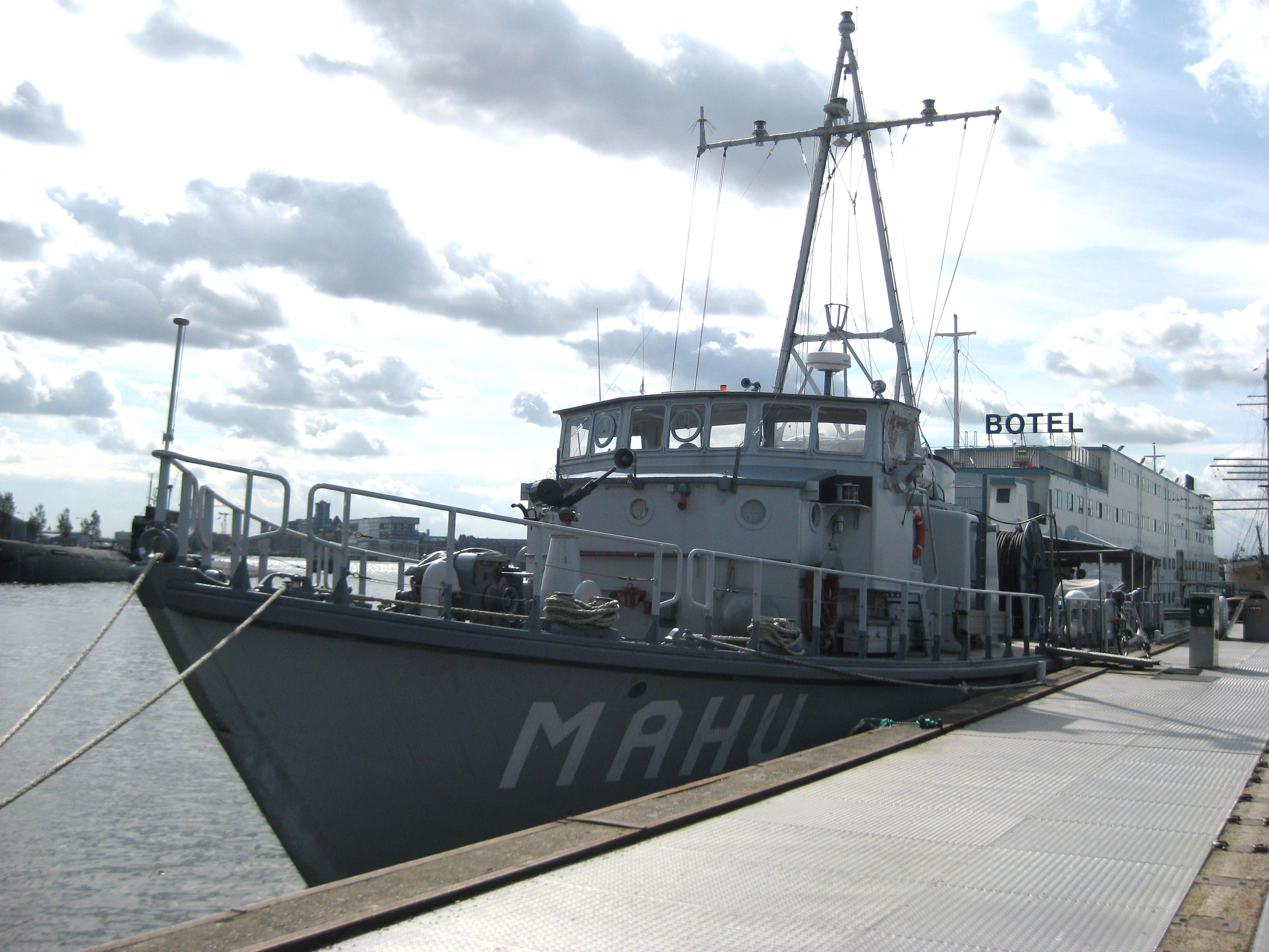 Hr.Ms.Mahu mijnenveger Van Straelenklasse 1961